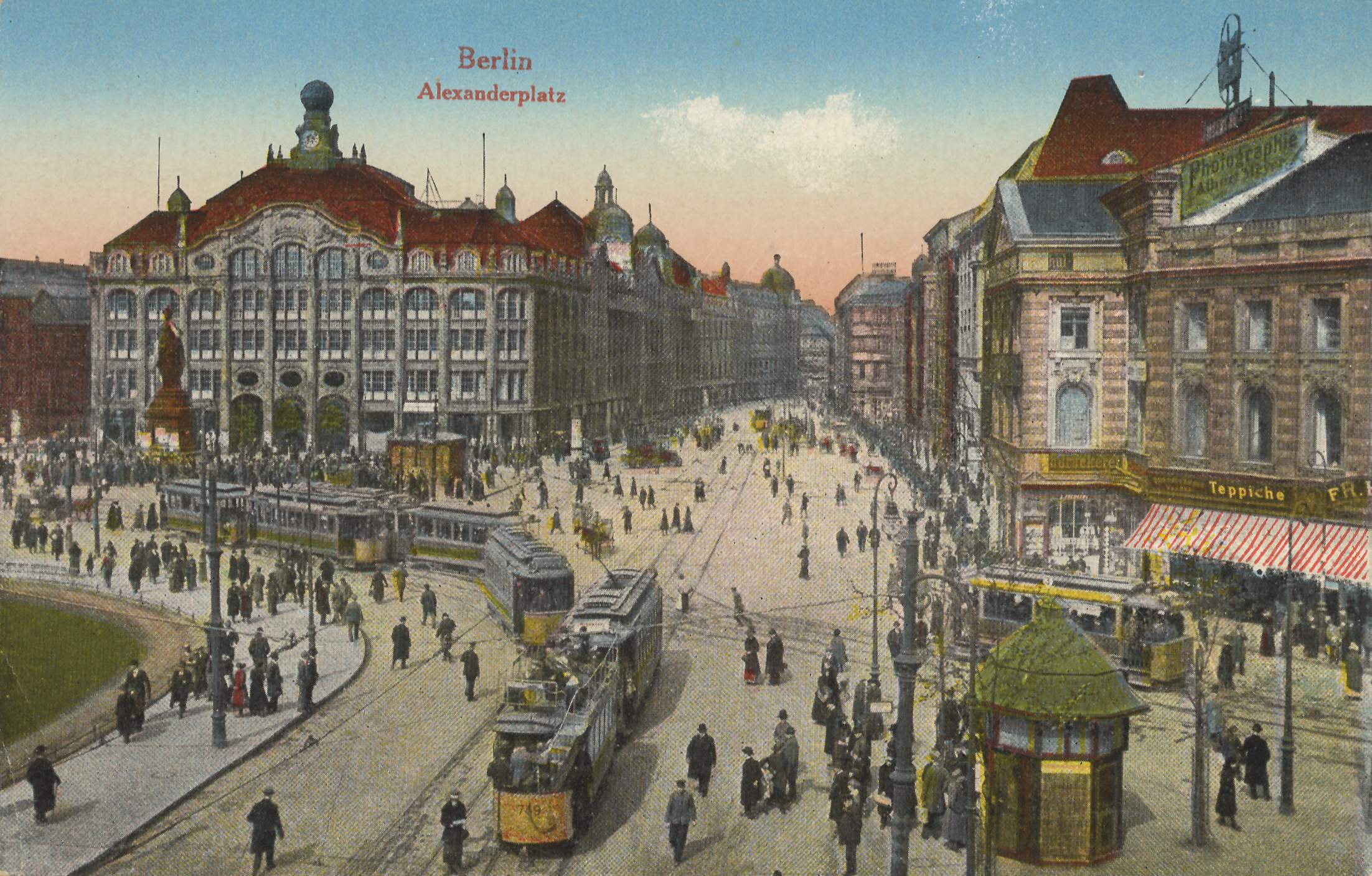 Alexanderplatz um 1905